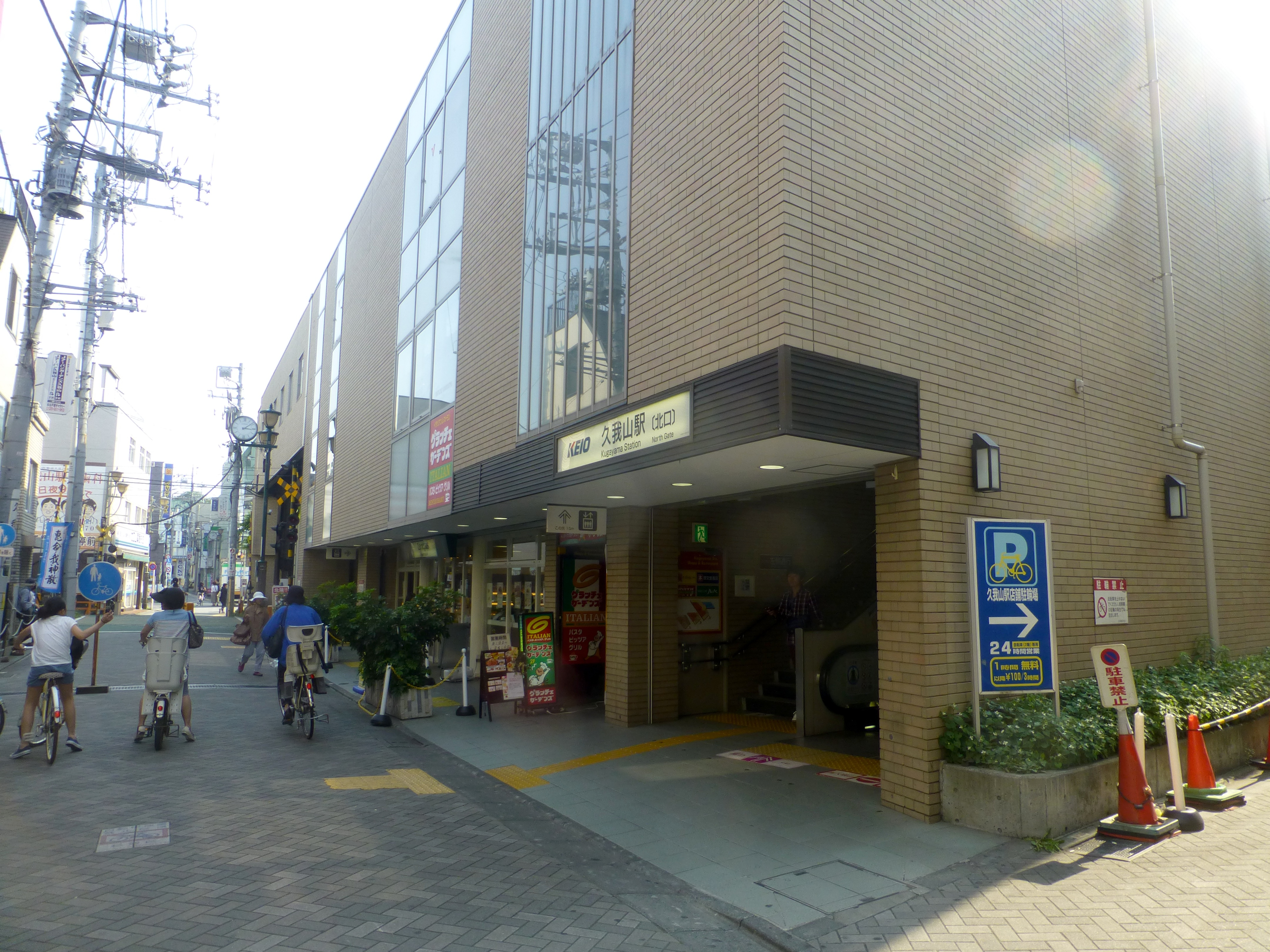 Kugayama Station north exit (久我山駅の北口)